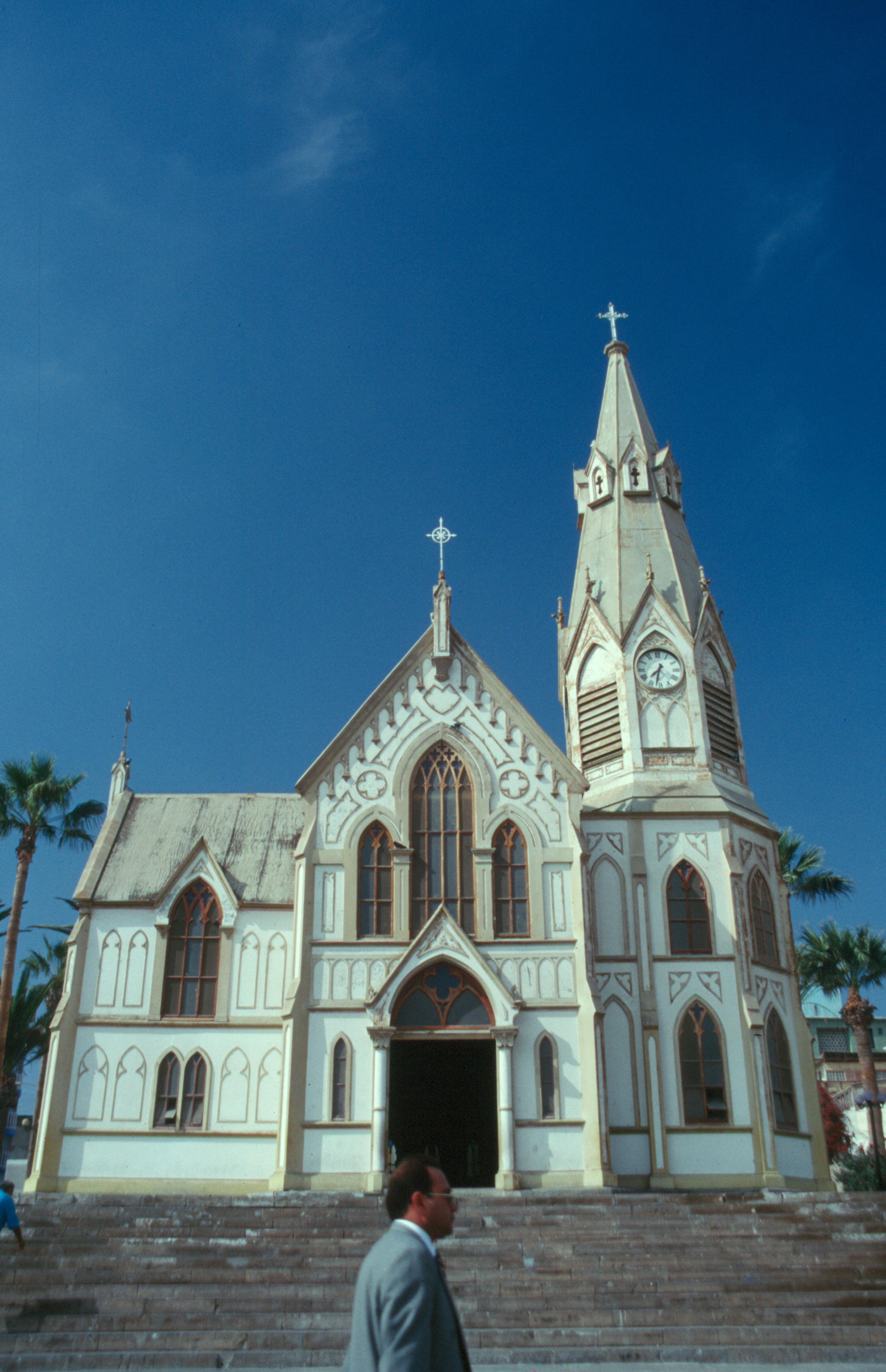 Beschreibung: Dies ist die Kathedrale in Arica / Chile Quelle: Stefan Bauer - selbst fotografiert Fotograf oder Zeichner: Stefan Bauer